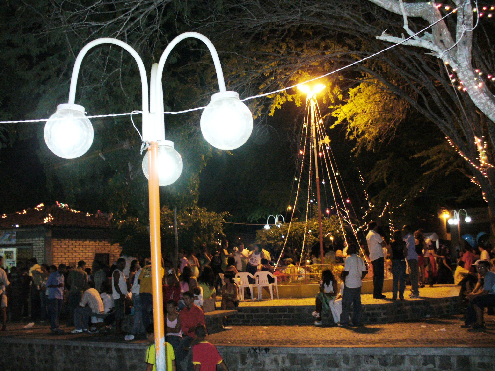 Foto do kiosk de Capela do alto Alegre - Bahia - Brasil.